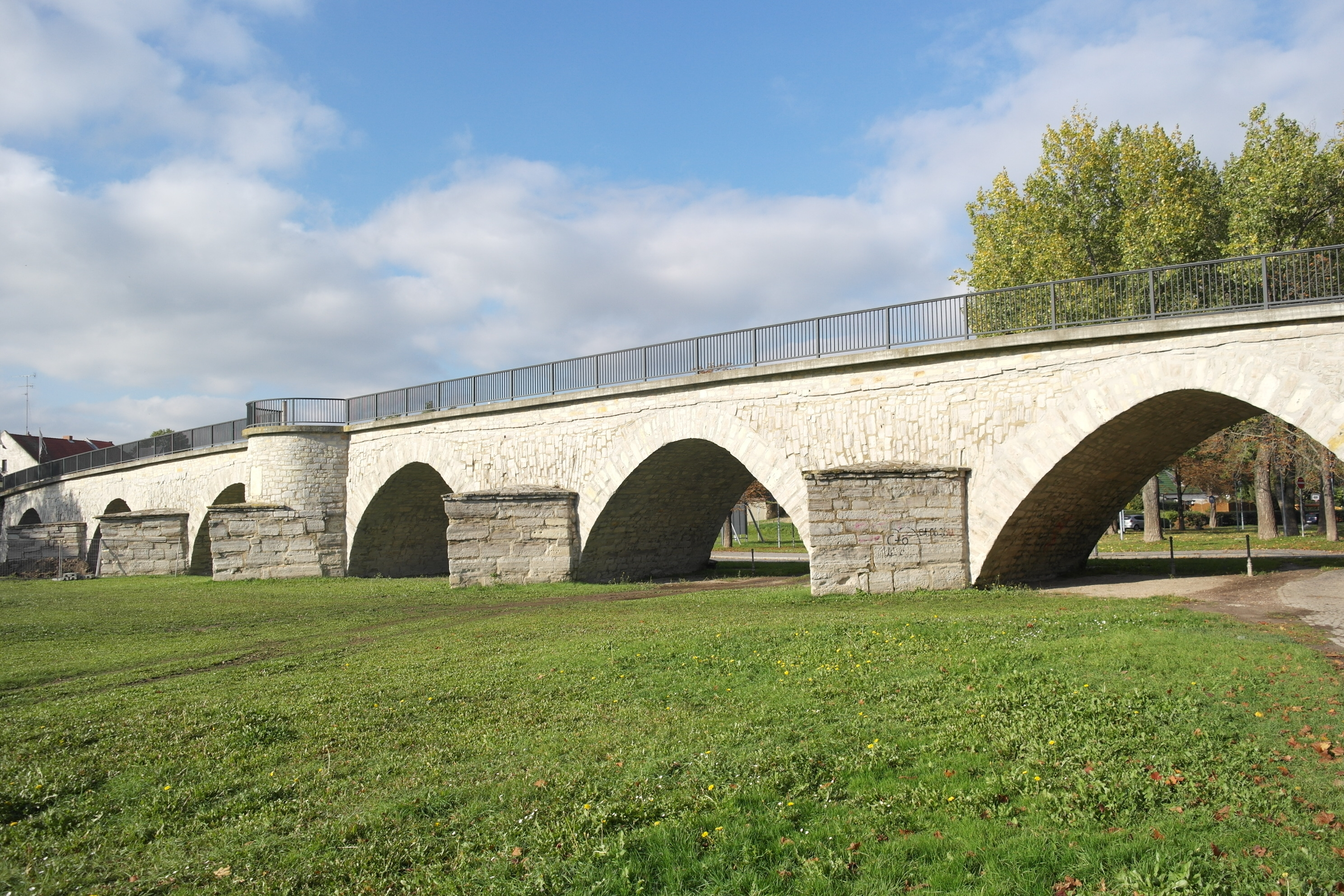 Bernburg, Waldauer Flutbrücke, Kulturdenkmal